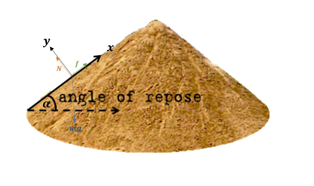 Angle of repose forces diagram